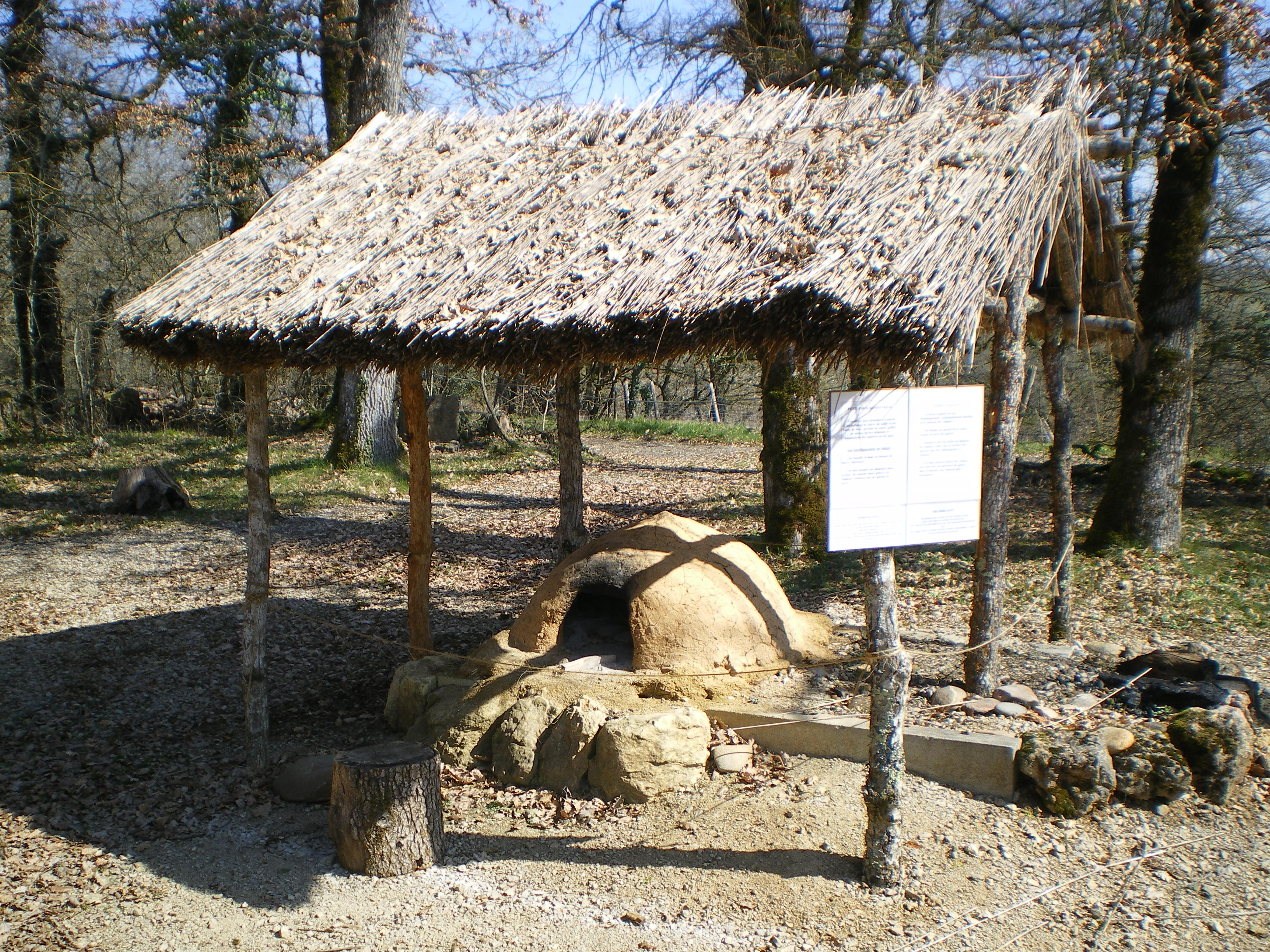 Musée préhistorique de Foissac, Aveyron, France